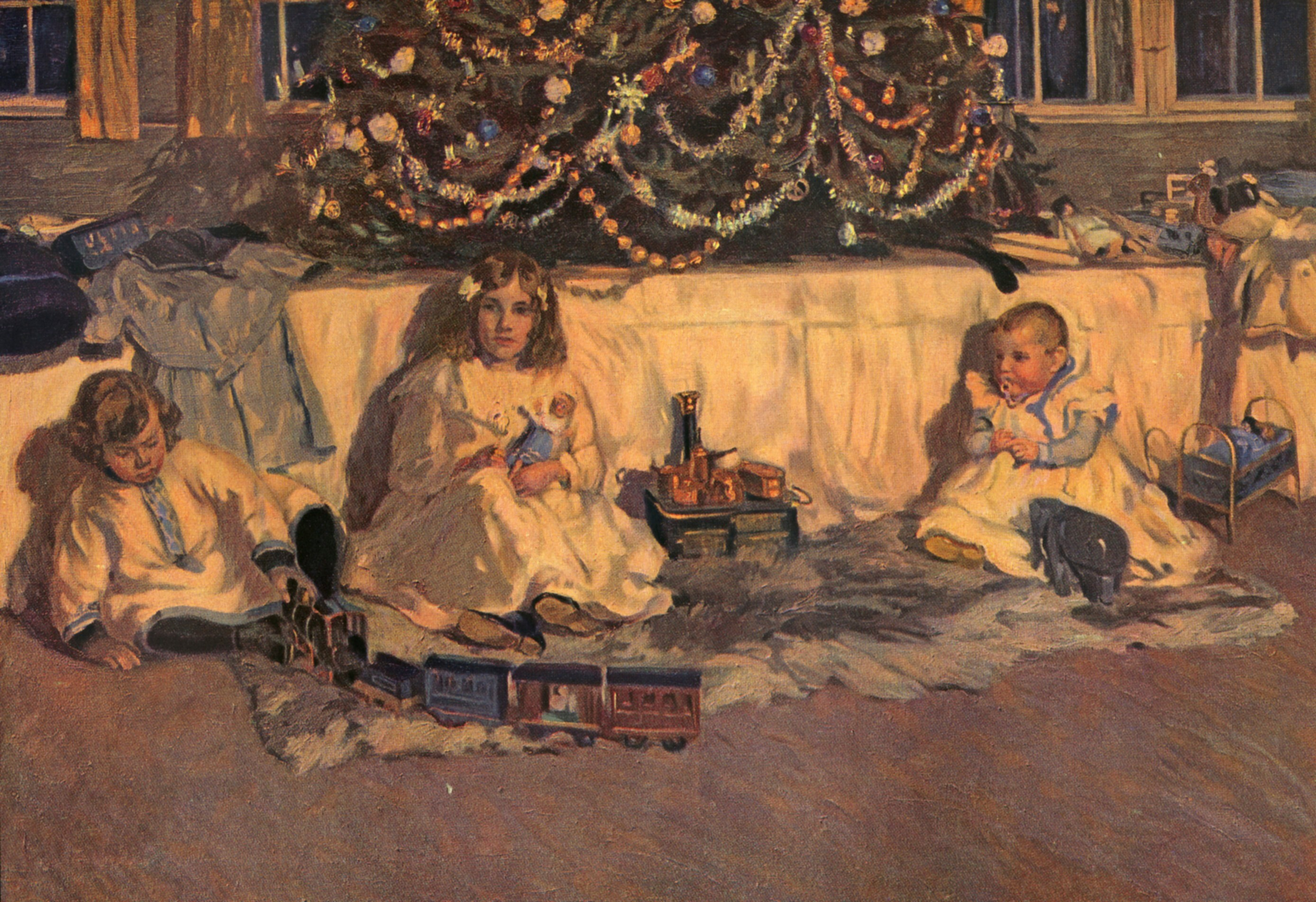 Kinder unter dem Weihnachtsbaum